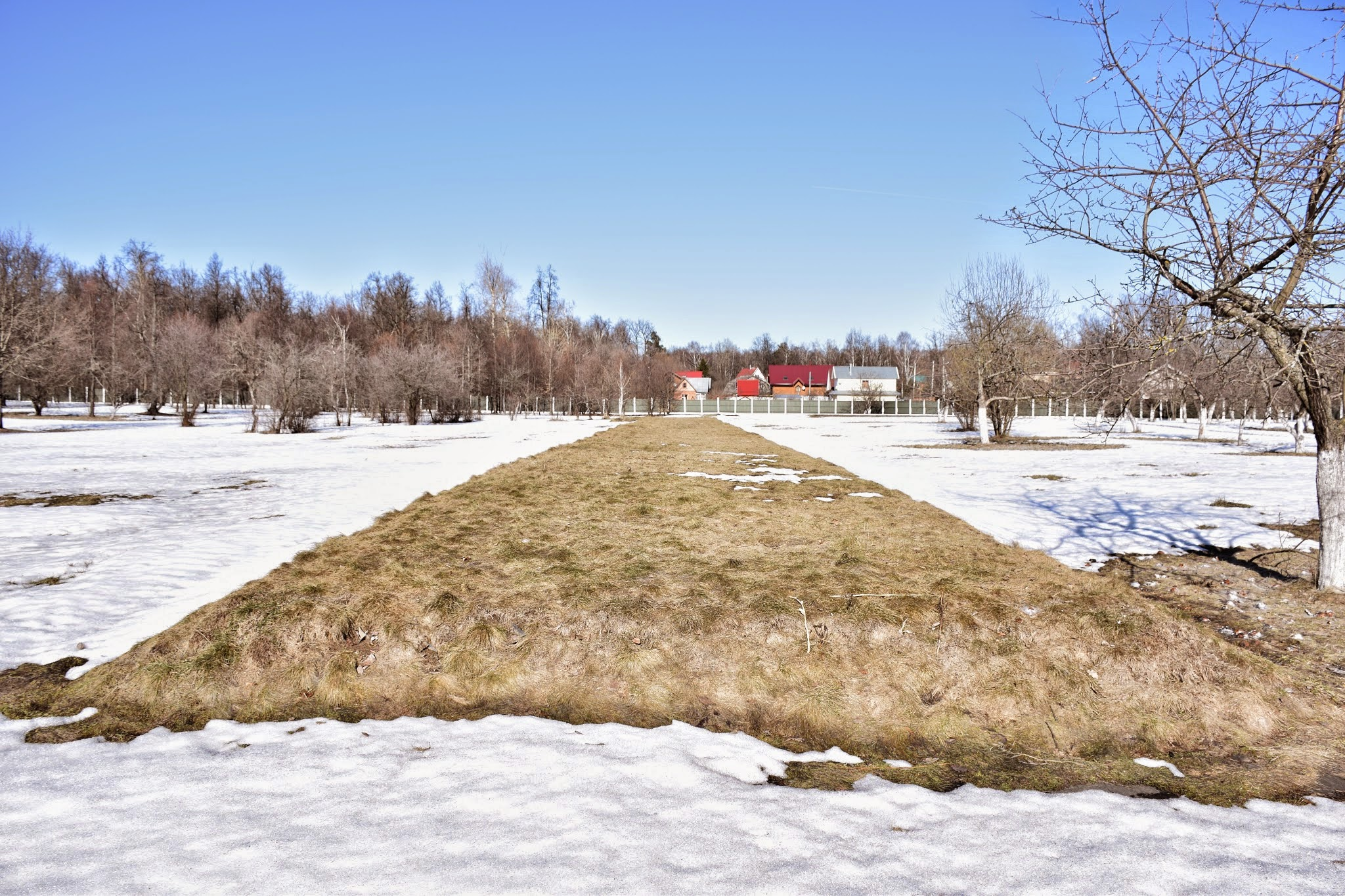 Бутовский полигон: Юбилейная улица, Дрожжино, Ленинский район, Московская область